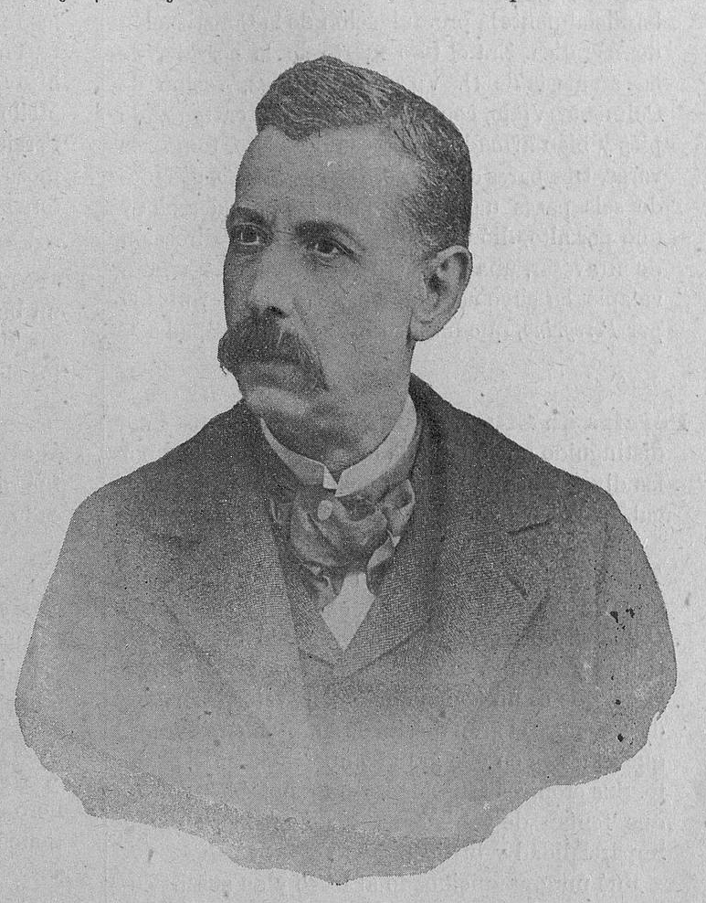 Retrato de Daniel Perea y Rojas.